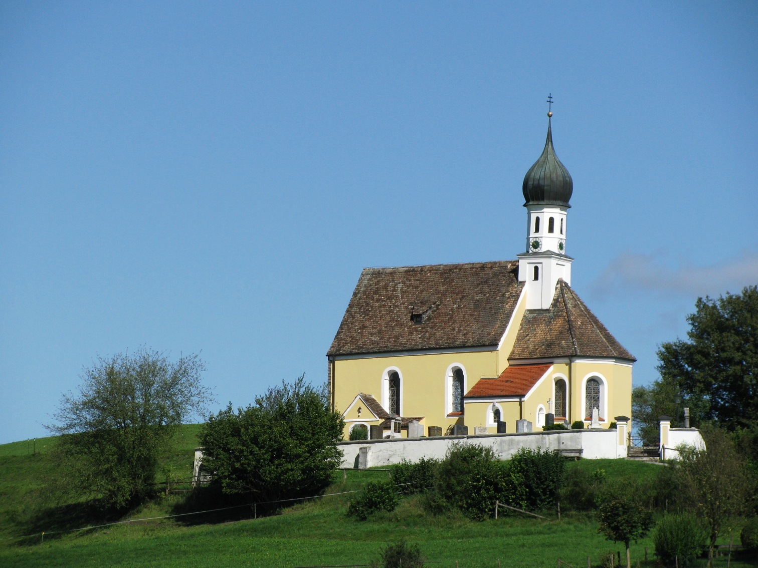 Filialkirche St. Mariä Himmelfahrt; Ansicht aus Südosten) This is a photograph of an architectural monument.